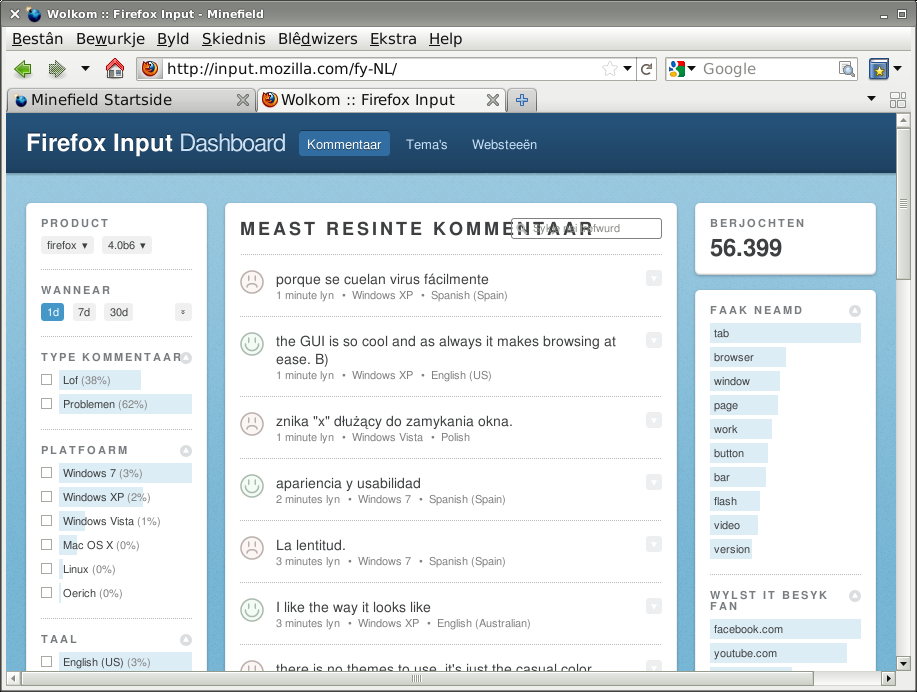 Firefox Input 1.8 montrata per nokta kunmetaĵo de Fajrovulpo antaŭ 4.0b7, en la okcidentfrisa lingvo.